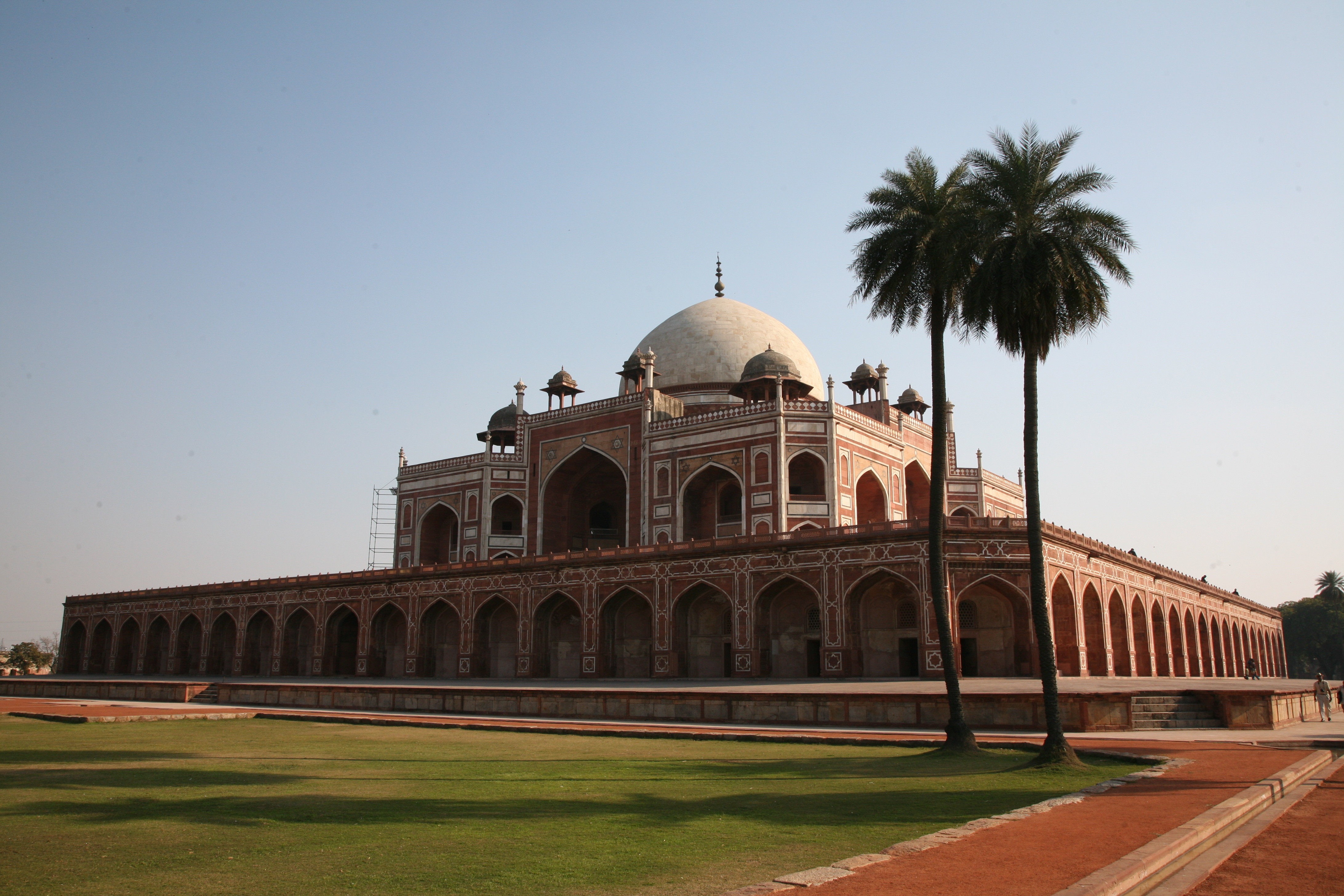 Humayun's Tomb, Delhi.